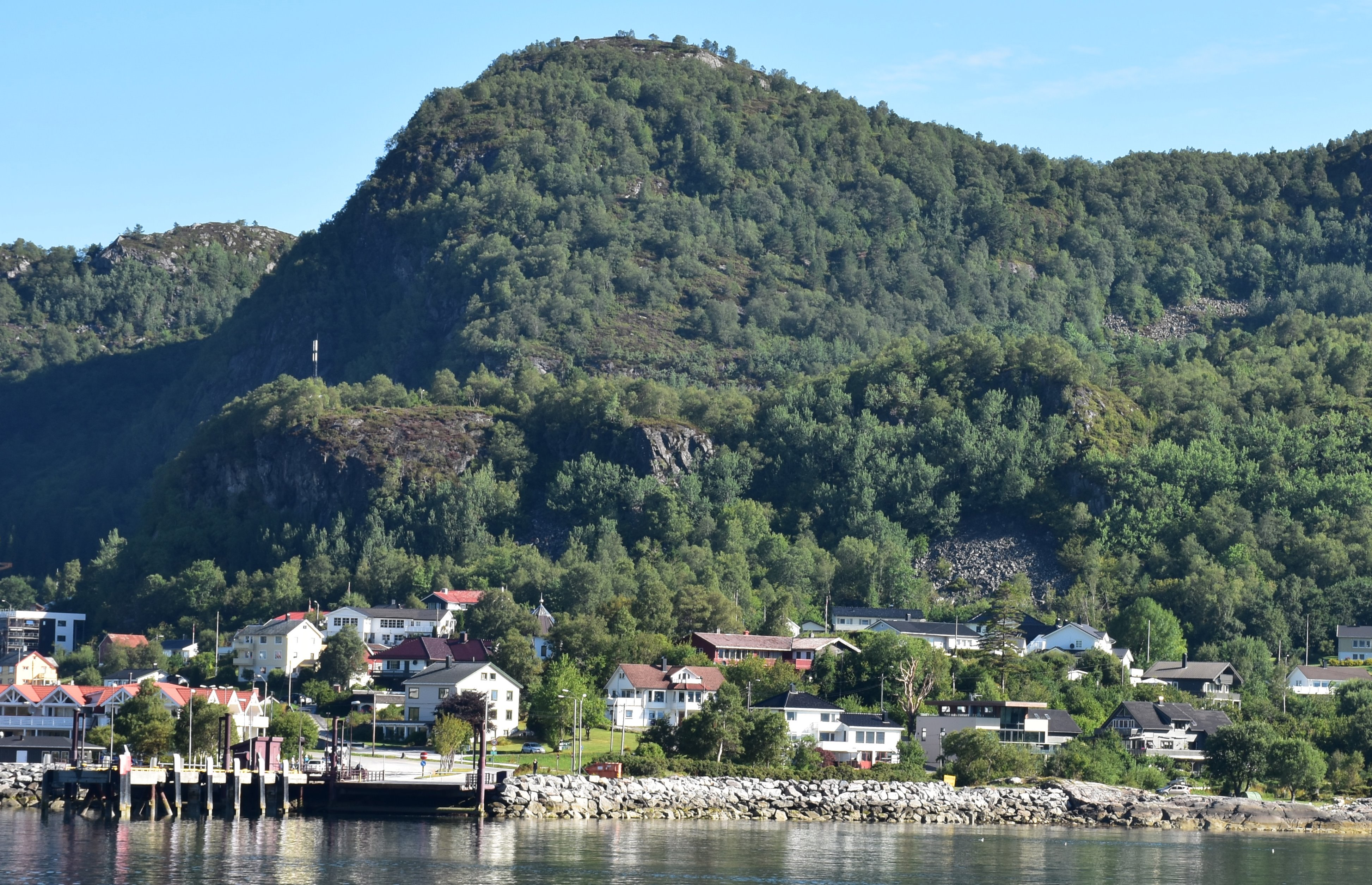 Solavågen fergekai